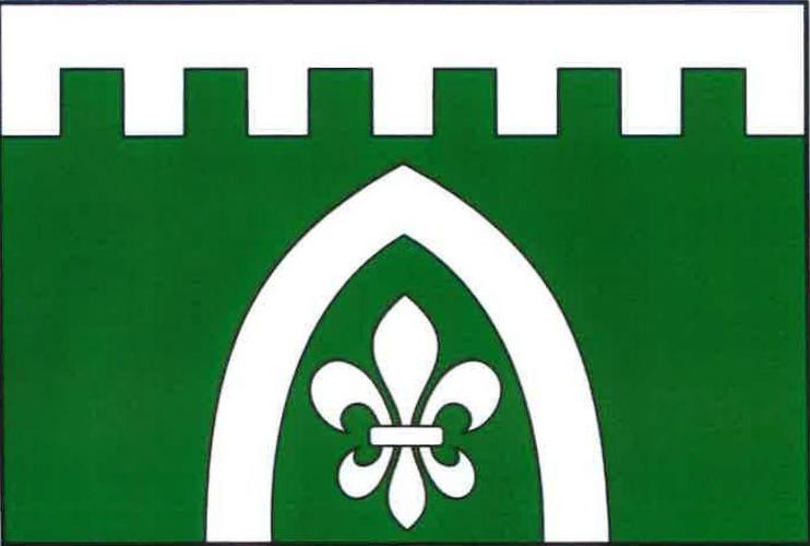 vlajka, Vyskeř, okres Semily